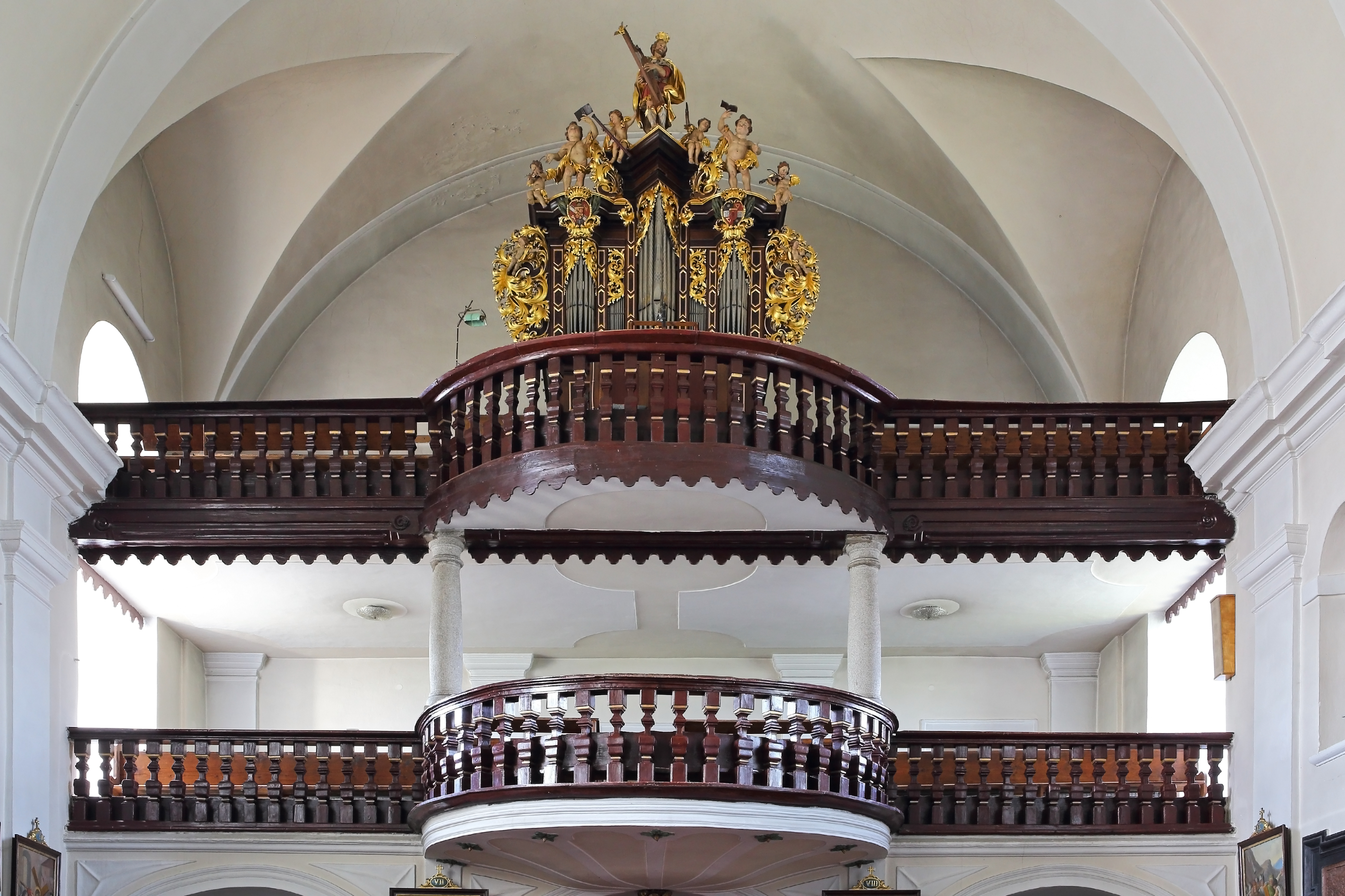 Pfarrkirche Kirchberg am Walde - Das Orgelgehäuse aus dem Jahr 1711 trägt die Figur David. Das Orgelwerk baute Gregor Hradetzky im Jahr 1975.